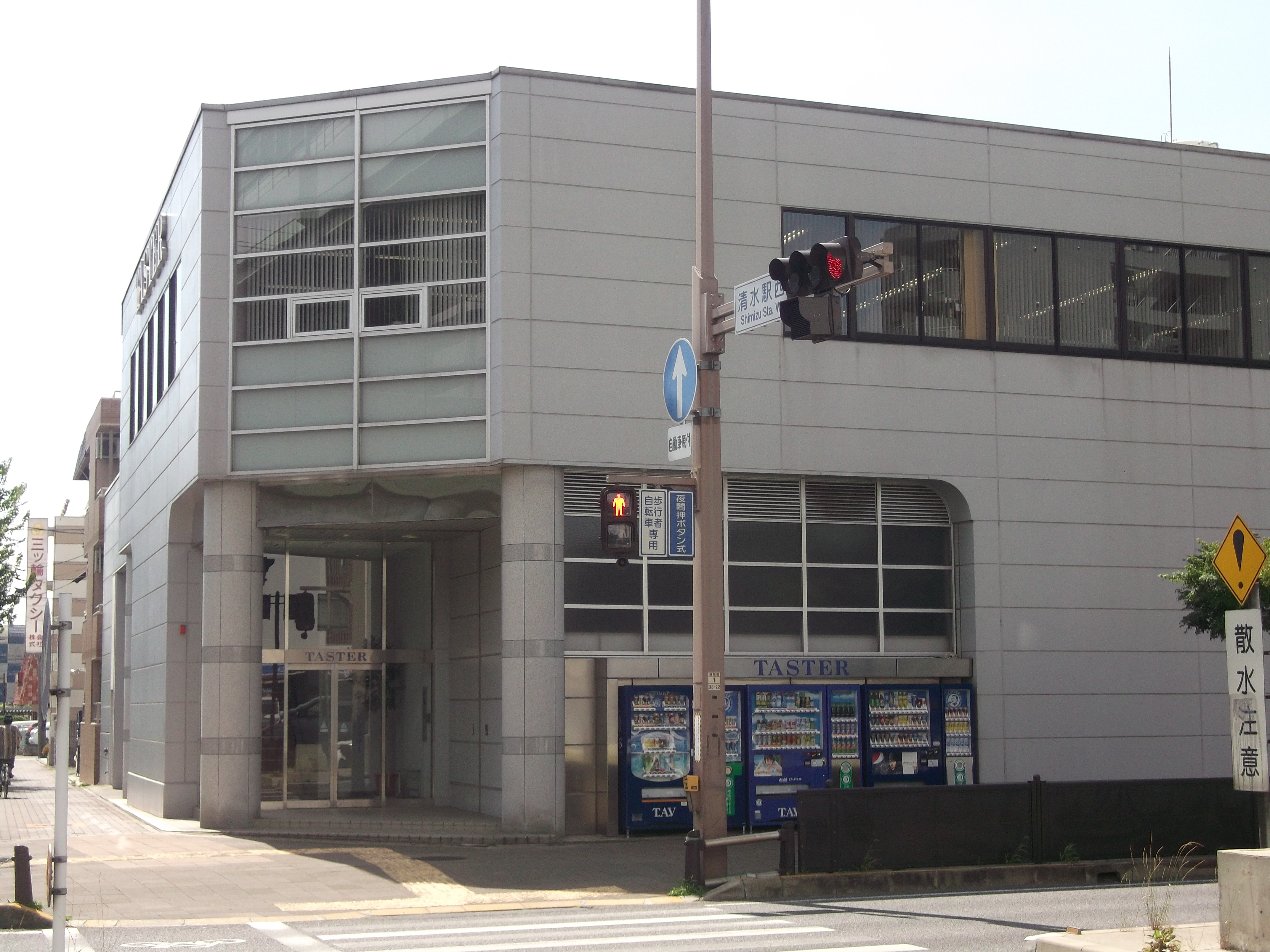 名古屋市北区清水のテイスター本社を東側公道南側より撮影